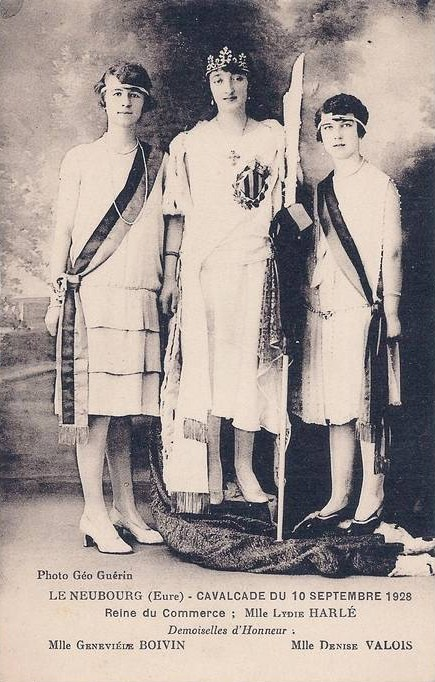 Le Neubourg (Eure) : à la Cavalcade du 10 septembre 1928, la Reine du Commerce Lydie Harlé et ses demoiselles d'honneur Geneviève Boivin et Denise Valois.